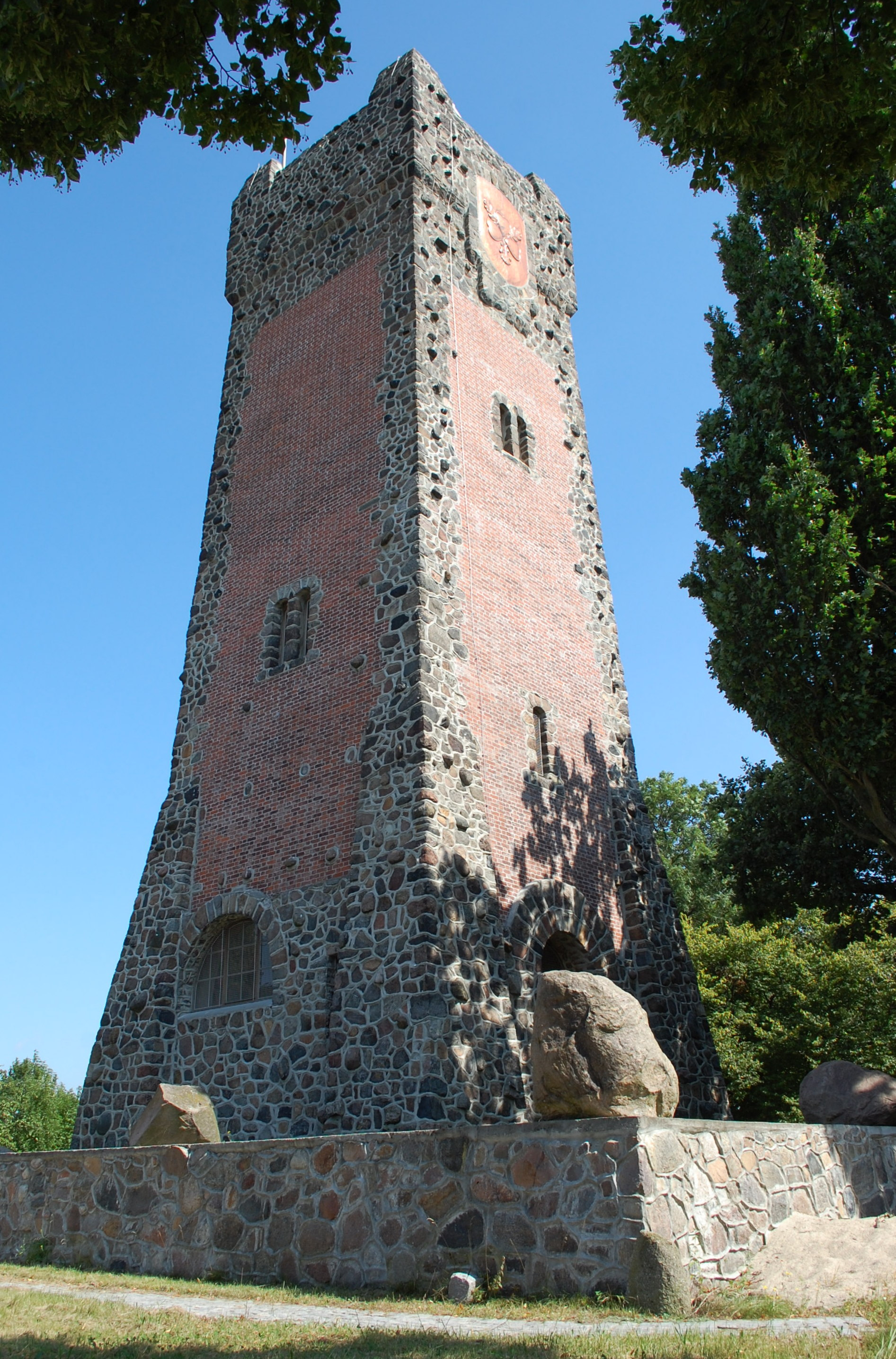 Bismarckturm bei Burg